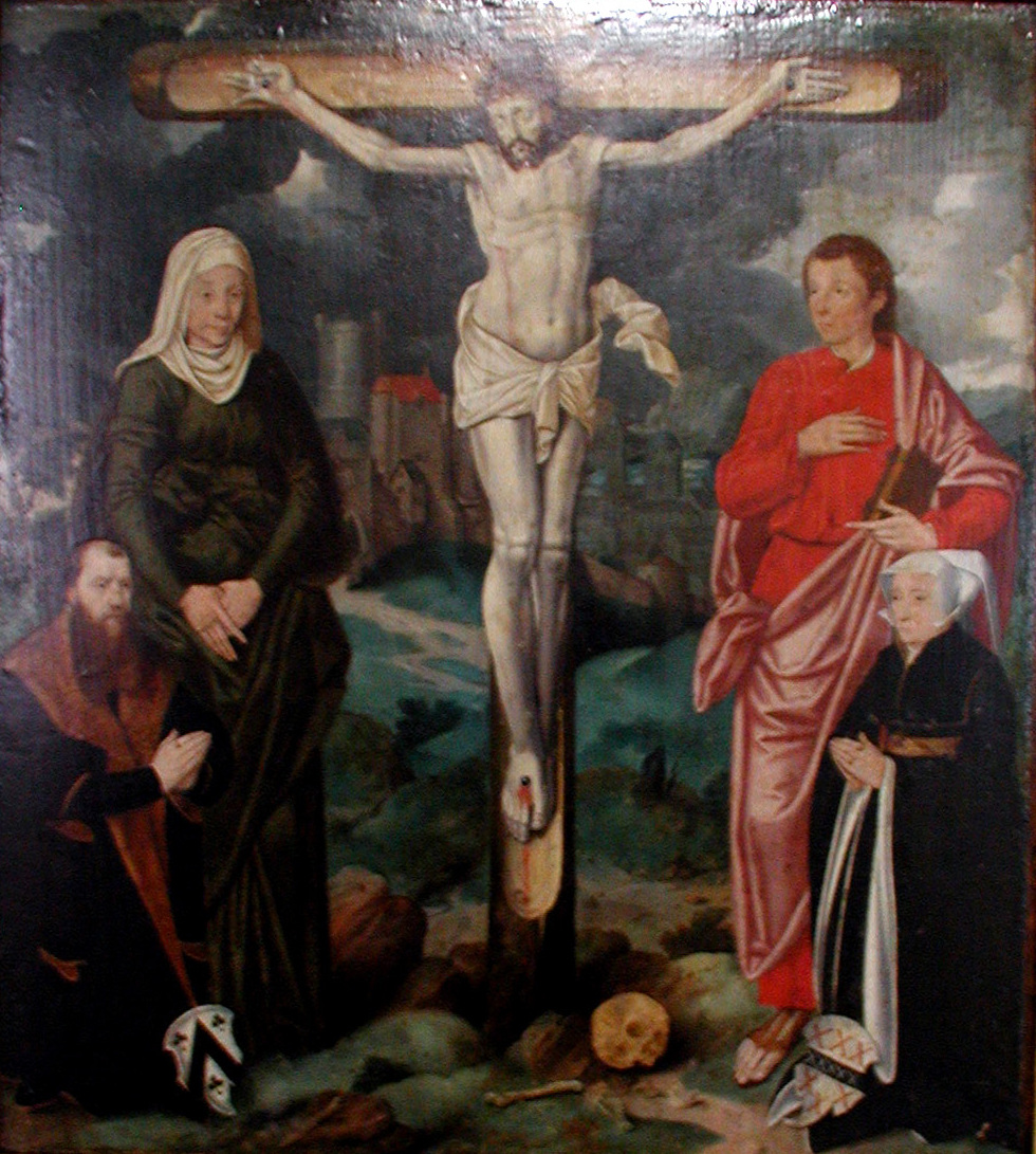 Mittelteil eines Triptychons aus St. Jakob (Auftrag Kirchmeister W) Hermann von Weinsberg, der Stifter kniet links, gehörte 1543 bis 1595 dem Rat an. Er war in erster Ehe mit „Weisgin Ripgin“ (1511 - 1557) verheiratet. Diese kniet als Stifterin rechts. Neben dem Kreuz stehen als Maria „Felgin Ripgin“, (Schwester der Stifterin) und als Johannes Evangelist Weinsbergs Stiefsohn „Johannes von Kaup“.